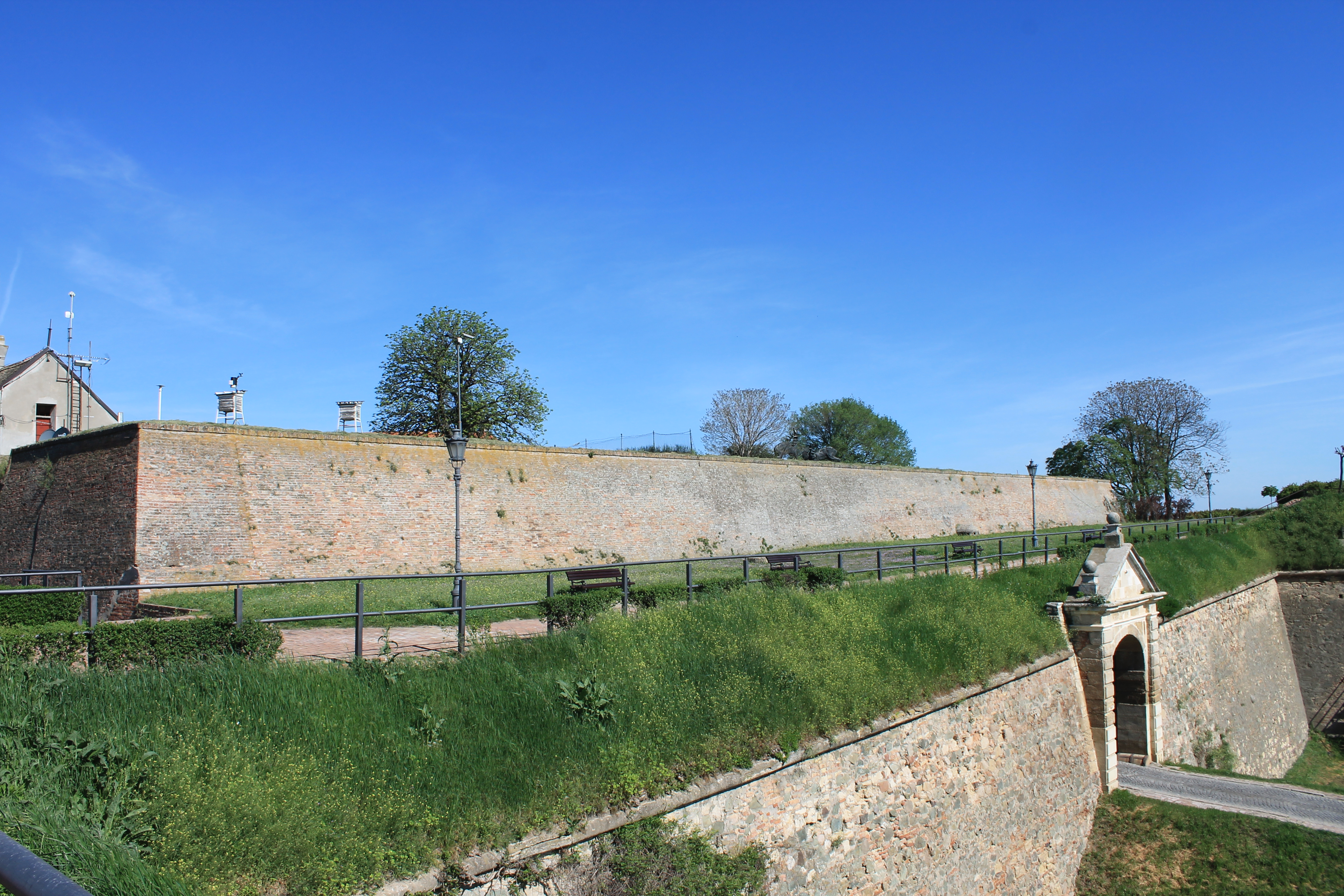 Petrovaradinska tvrđava